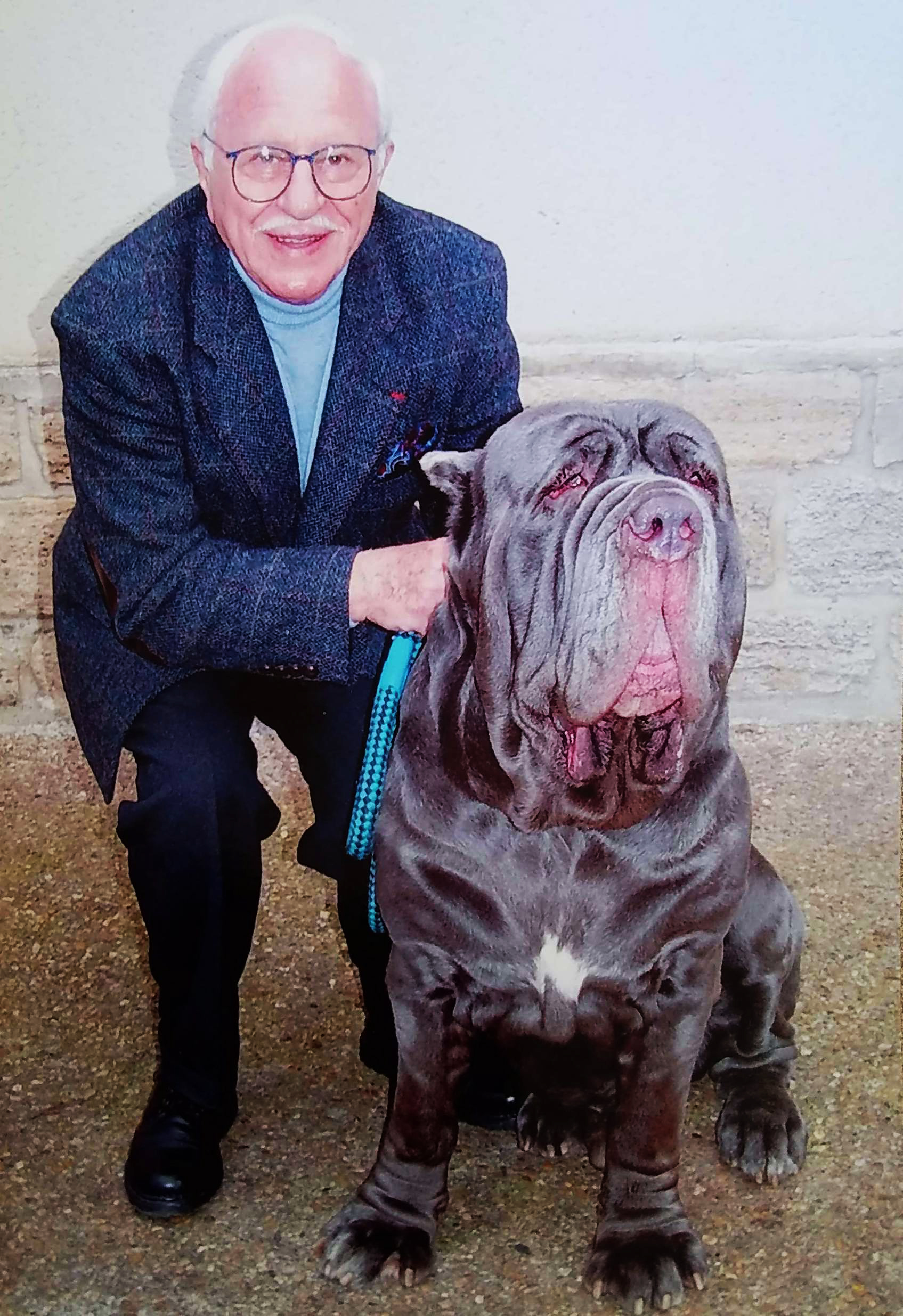 Michel Klein, docteur vétérinaire, avec un chien Mâtin de Naples